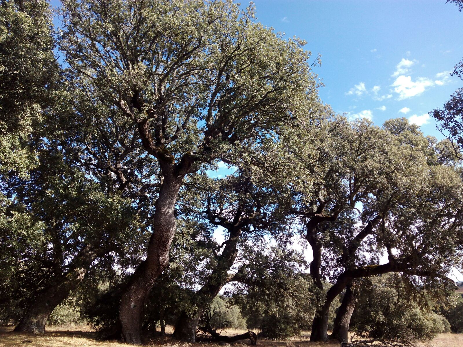 Encinar de Camparañon